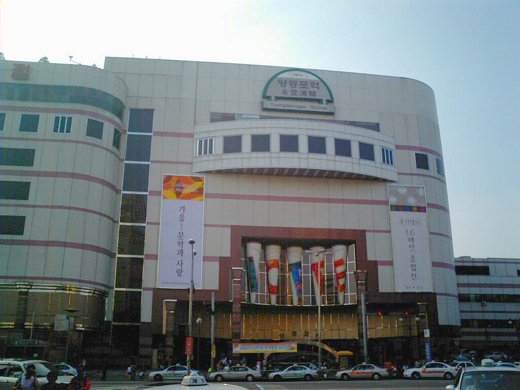 京釜線永登浦駅